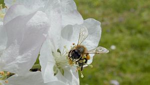 Honigbiene auf einer Apfelblüte (Original text: Eine Honigbiene auf einer Apfelblüte) Kamera: Nikon Coolpix 950 Software: GIMP Andere Versionen